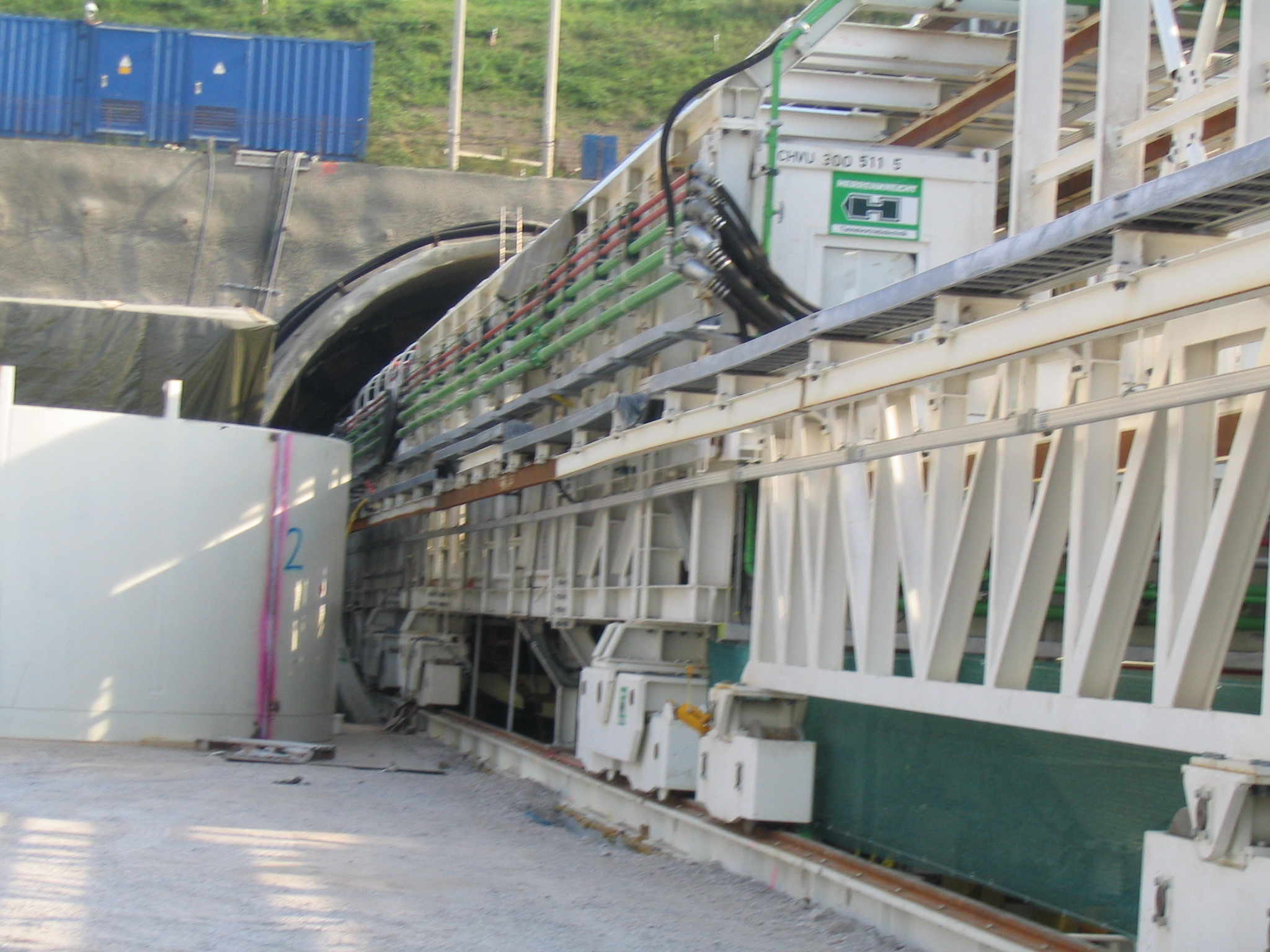 Westportal bei Chorherrn mit Tunnelbohrmaschiene